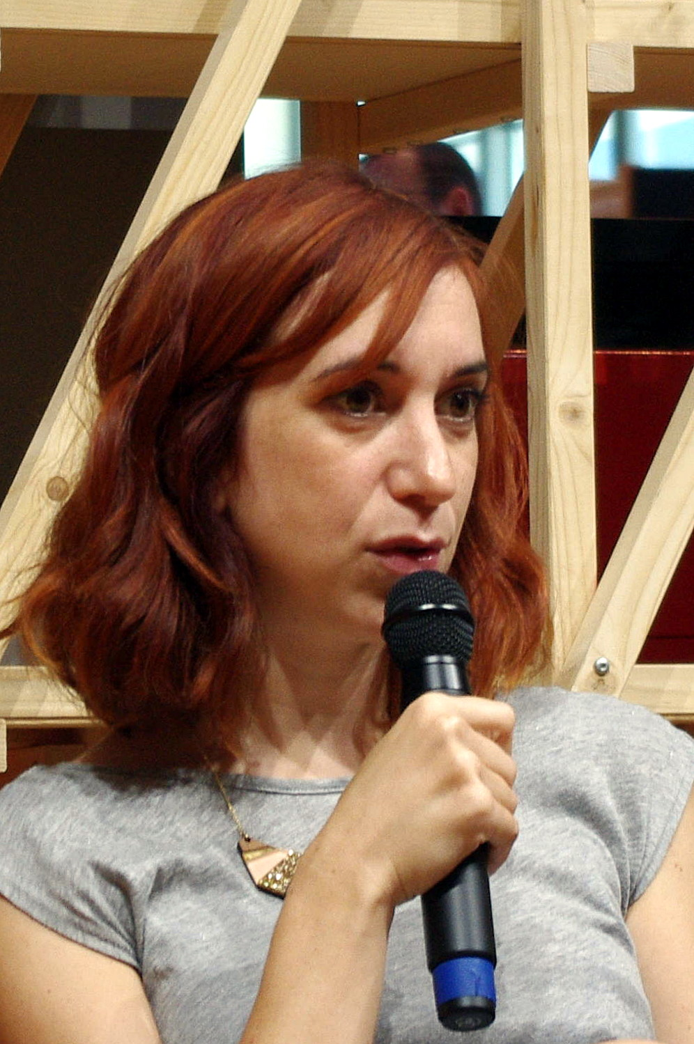 Buchmesse Frankfurt im Oktober 2017 - Penelope Bagieu im französischen Pavillon.